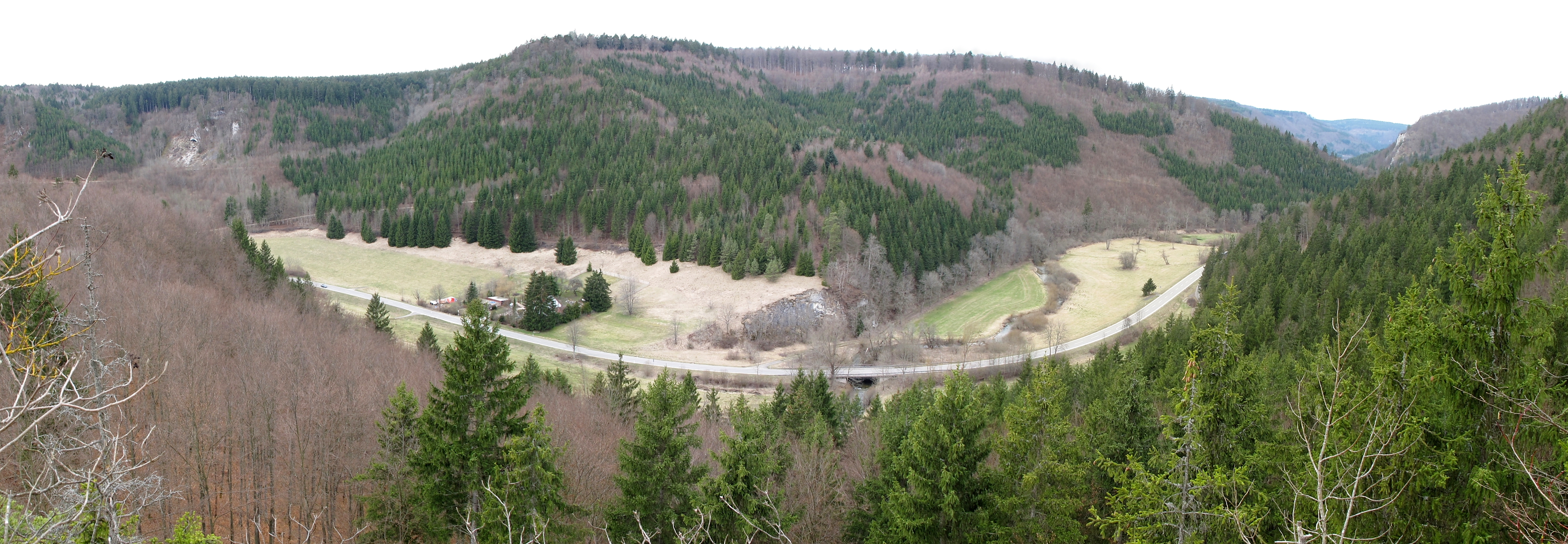 Panoramablick vom westlichen Burgfels hinunter ins Bäratal.